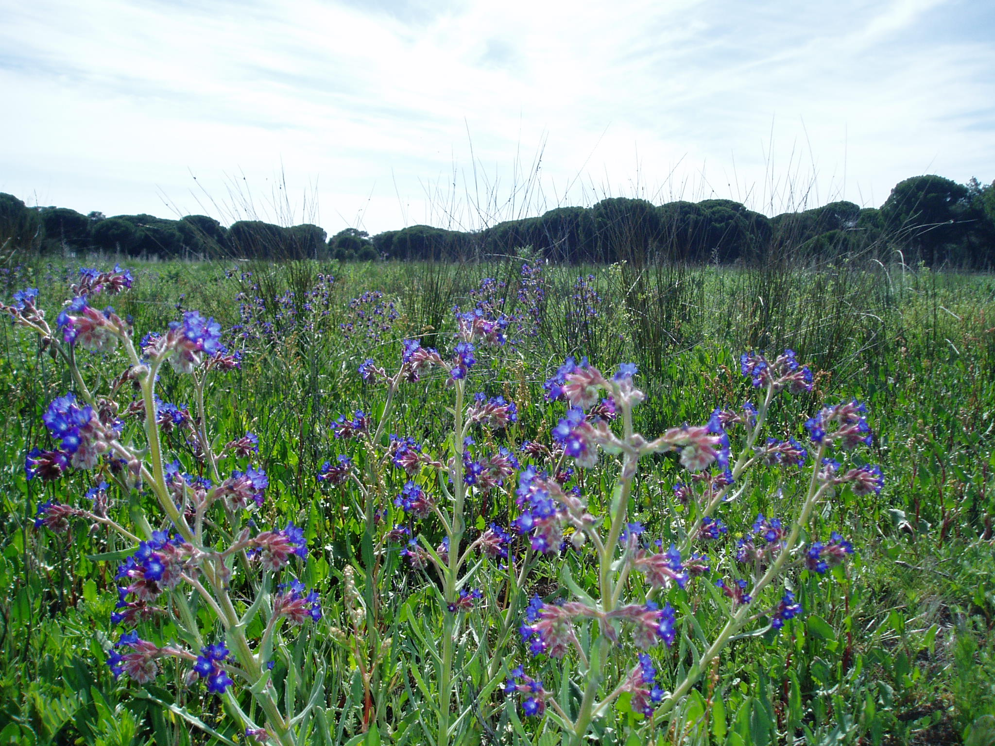 Salgüeros de Aldeamayor This is a photography of a Site of Community Importance in Spain with the ID: ES4180124. Natura2000 entry, EEA entry